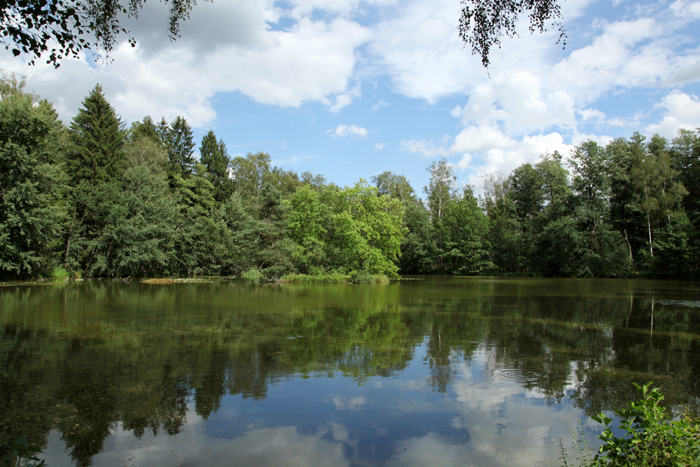 Der Steinsee